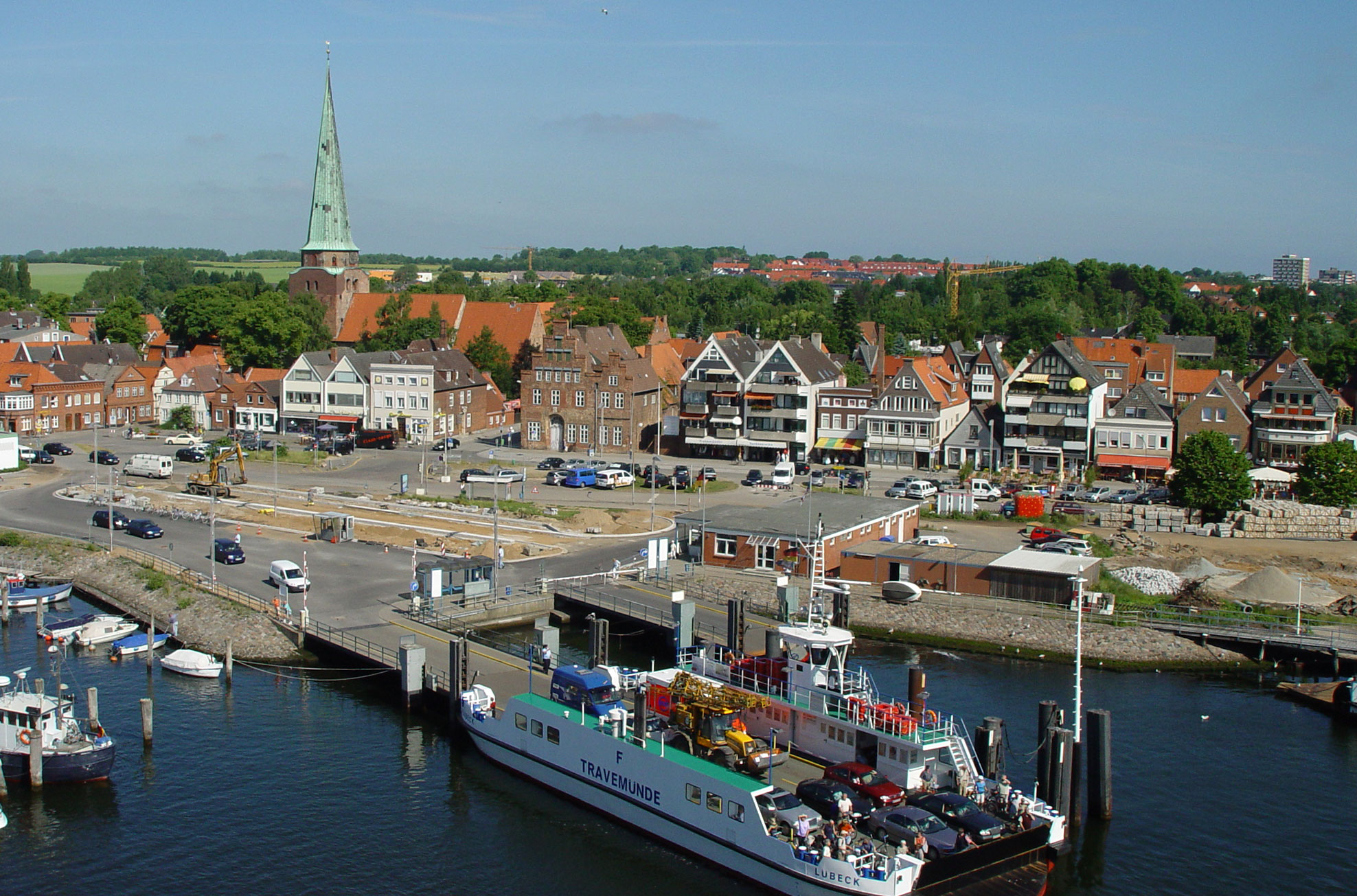 Altstadt Travemünde mit St.-Lorenz-Kirche und Priwall-Fähre